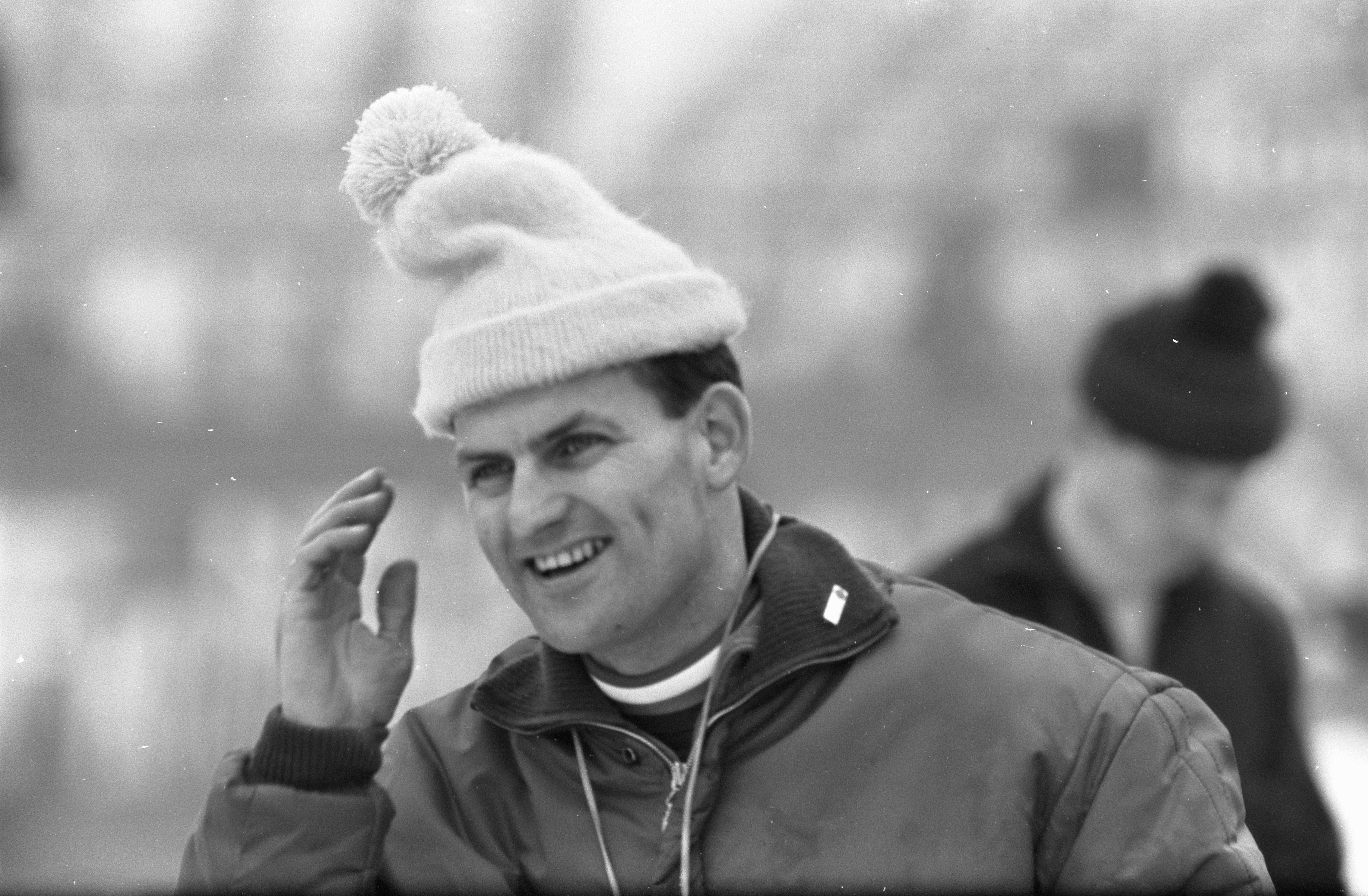 Collectie / Archief : Fotocollectie Anefo Reportage / Serie : [ onbekend ] Beschrijving : Schaatswedstrijden om IJsselcup te Deventer; coach herenploeg Leen Pfrommer Datum : 23 november 1968 Locatie : Deventer, Overijssel Trefwoorden : coaches, mutsen Persoonsnaam : Pfrommer, Leen Fotograaf : Kroon, Ron / Anefo Auteursrechthebbende : Nationaal Archief Materiaalsoort : Negatief (zwart/wit) Nummer archiefinventaris : bekijk toegang 2.24.01.05 Bestanddeelnummer : 921-8817